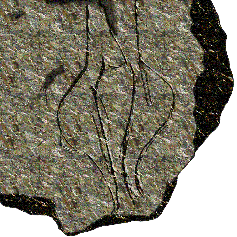 Placa de pizarra grabada con dos venus estilizadas (claviformes) enfrentadas, como en una danza. Gönnersdorf (Neuwied, Germany)